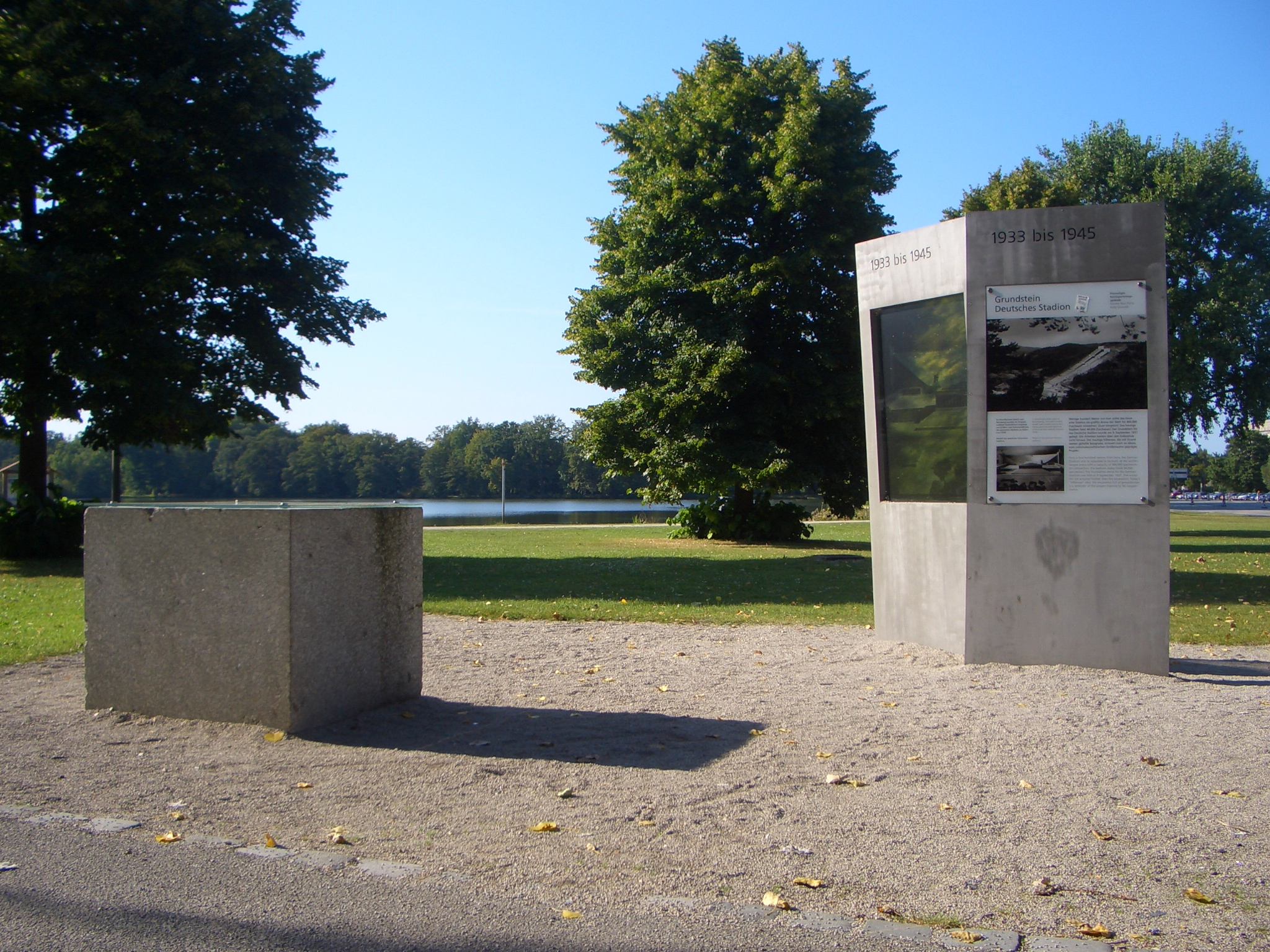 Grundstein Deutsches Stadion